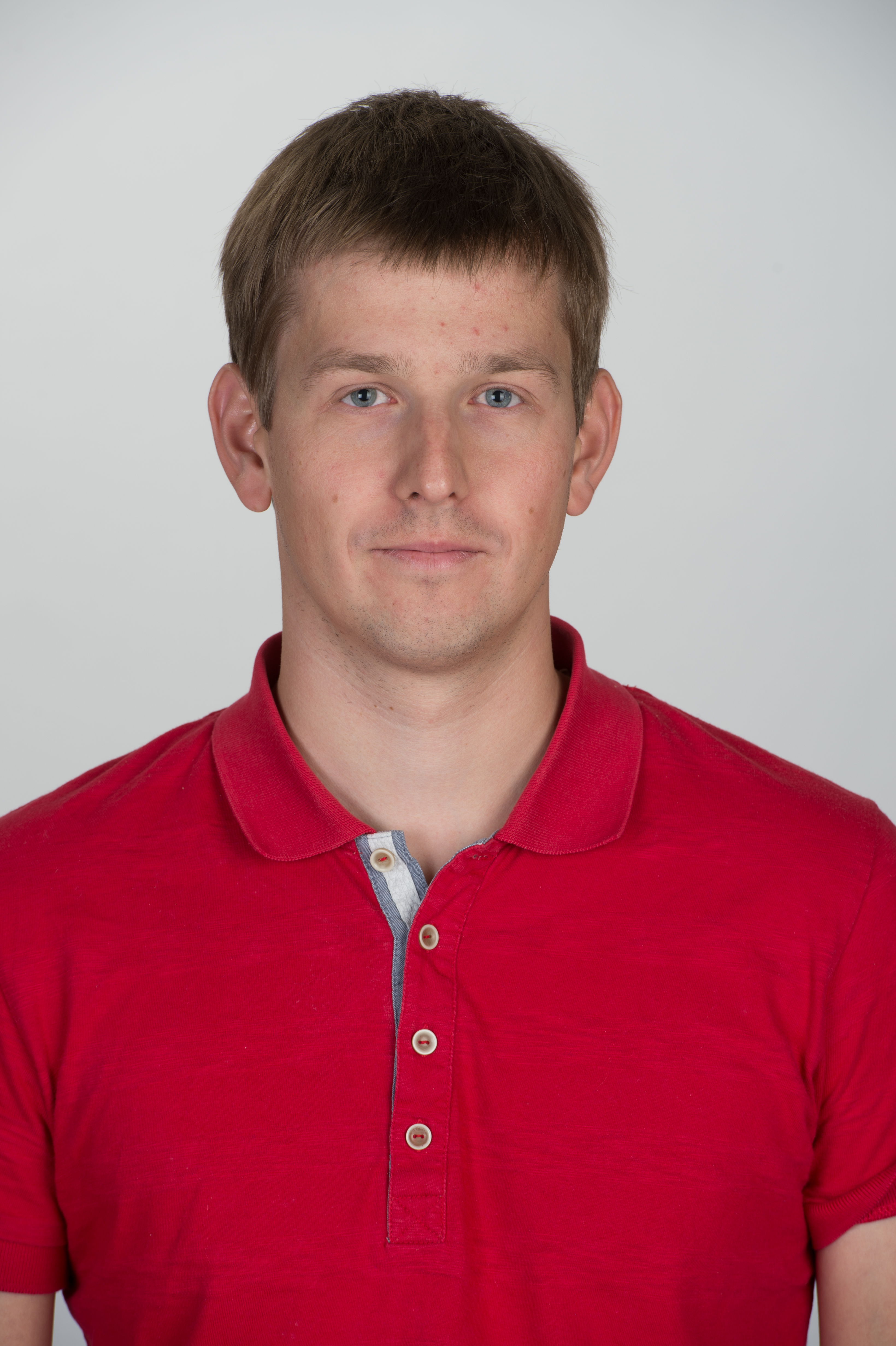 Holger Roonemaa